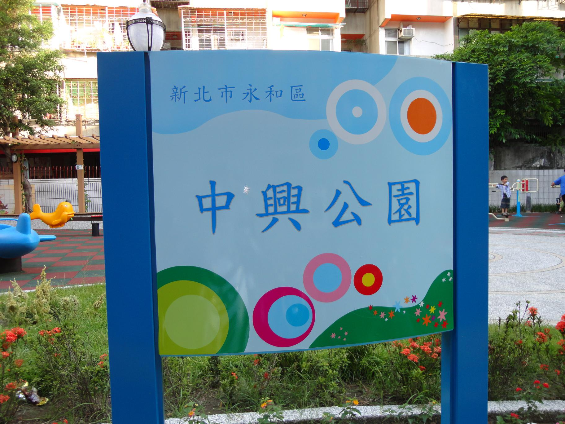 新北市永和區中興社區公園的公園牌。